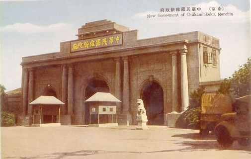 Republic of China New government（中华民国维新政府）